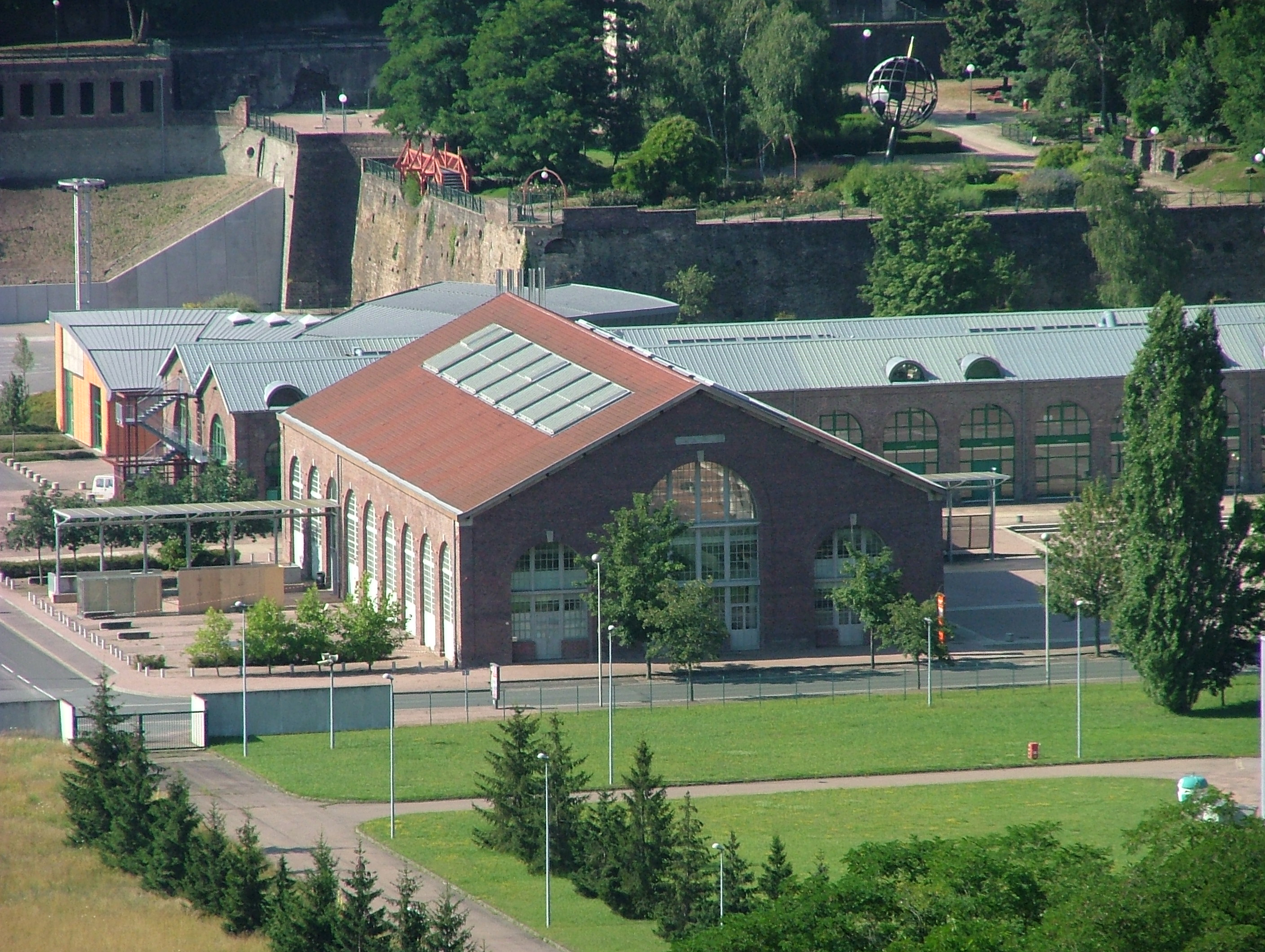 University Library of Le Creusot, France Bibliothèque universitaire du Creusot